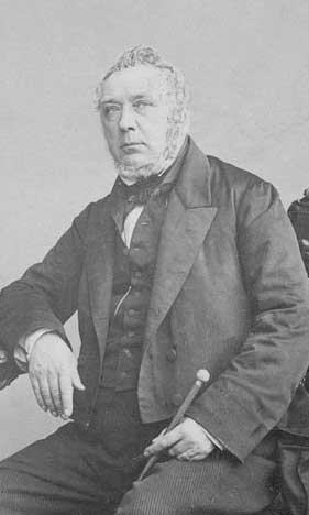 Wyncko Johannes Tonckens (1804-1875)